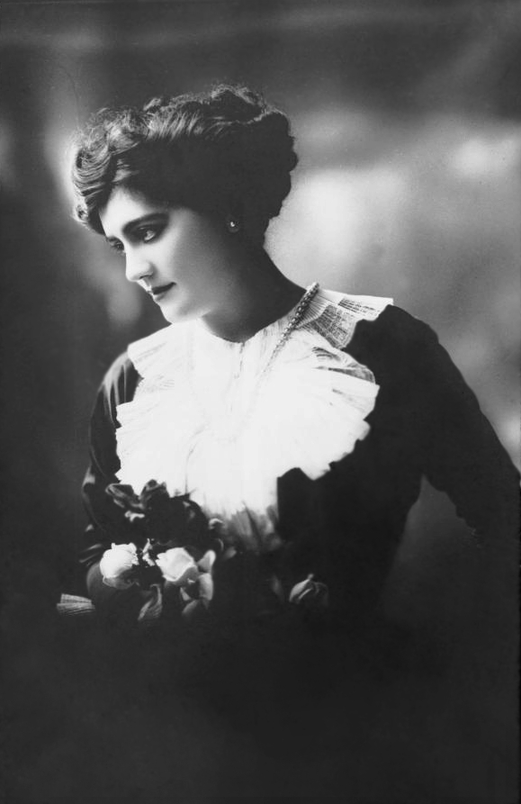 Mafalda Salvatini (1888–1971), Opernsängerin, Schülerin von Pauline Viardot-García und Jean de Reszke, Geliebte von Adolf Friedrich VI. von Mecklenburg-Strelitz und Mutter seiner zwei Kinder